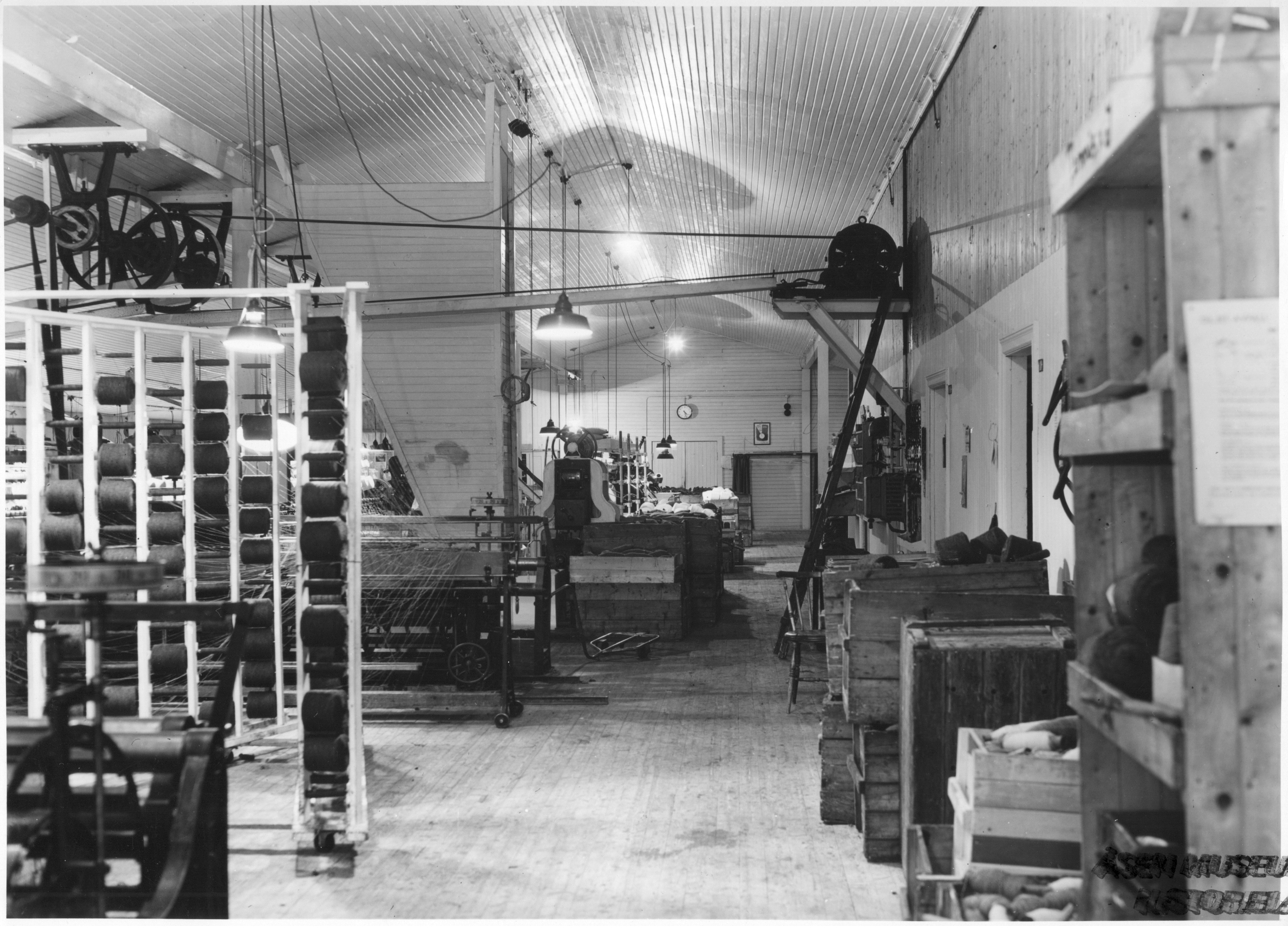 Interiør på De Forenede Ullvarefabrikker (D.F.U.) i Åsen i 1947. Fotograf / Photographer: Einar Einarsen Fotoeier / Photo owner: Åsen Museum og Historielag Digitalisering / Digitizing: Arne Langås Foto-ID / Photo ID: 001-0331 Har du utfyllende opplysninger? Legg gjerne igjen en kommentar nedenfor eller send e-post til . | Do you have additional information? Please leave a comment or send an e-mail to .